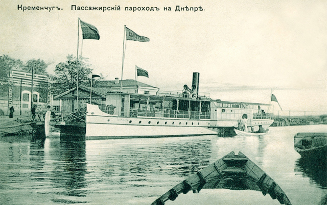 Postcards of old Kremenchuk. Пристань та пароплав на Дніпрі.